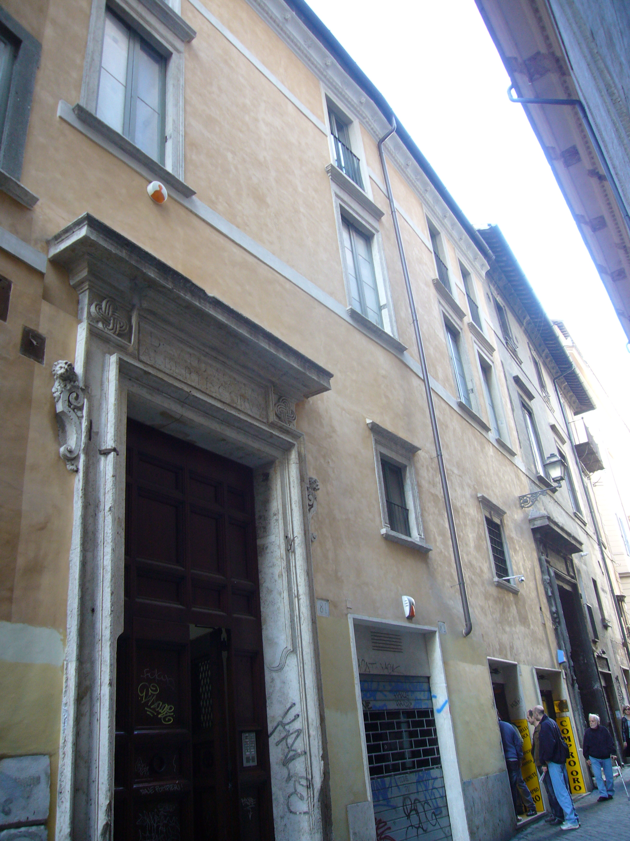 Roma, via dei Pettinari 81 e 84: i due portoni degli edifici gemelli della Domus Salomonia Albertiscorum (palazzo Alberteschi-Salomoni).